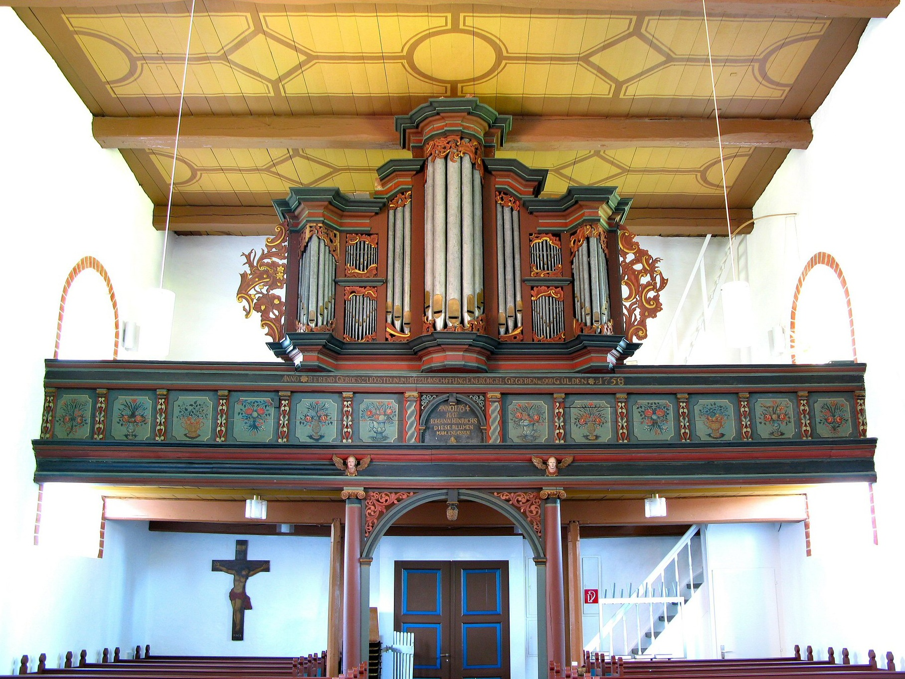 Orgel in Dunum, Landkreis Wittmund